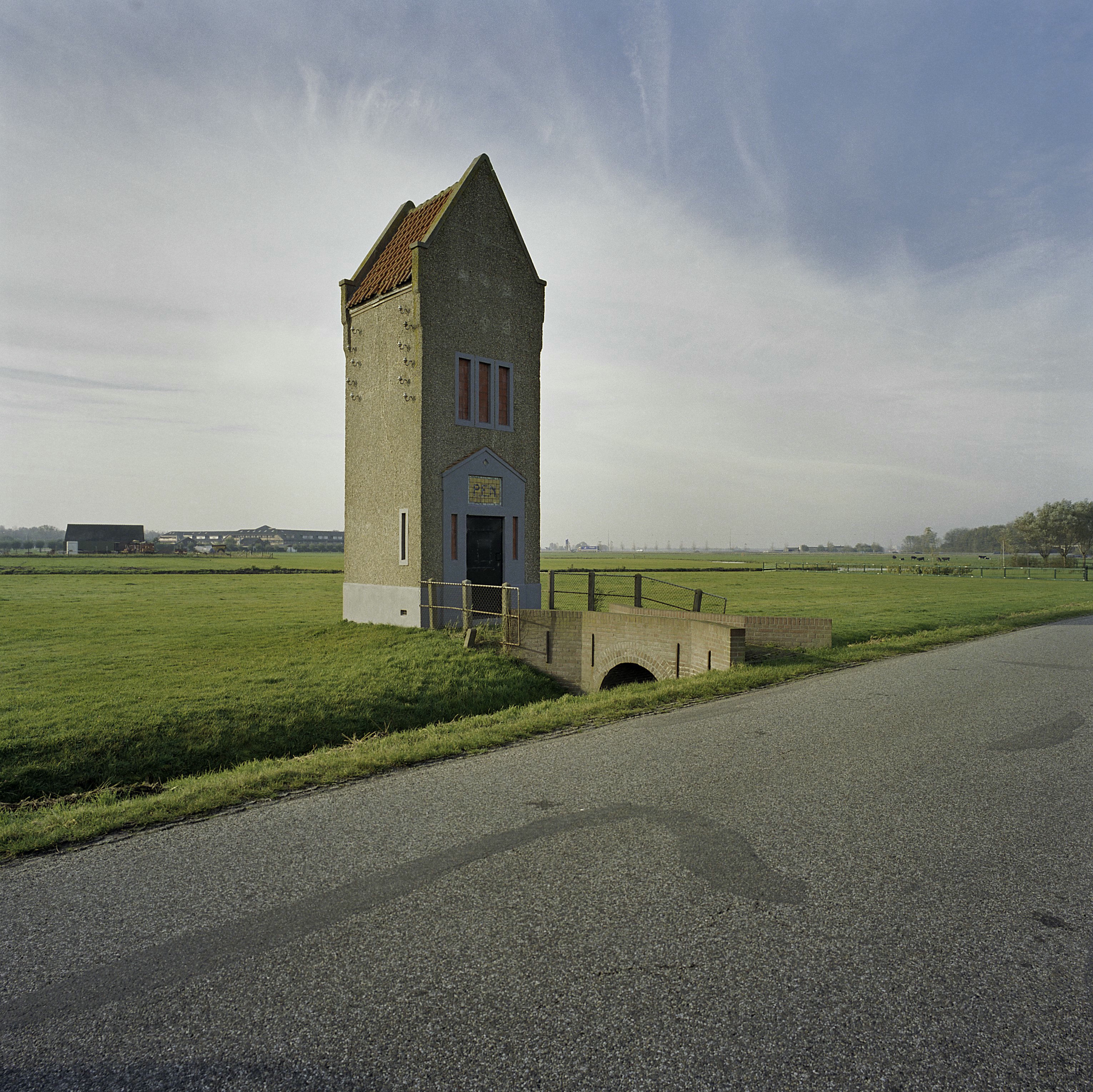 Trafohuisje: Overzicht trafohuisje (opmerking: Gefotografeerd voor Monumenten In Nederland Noord-Holland)